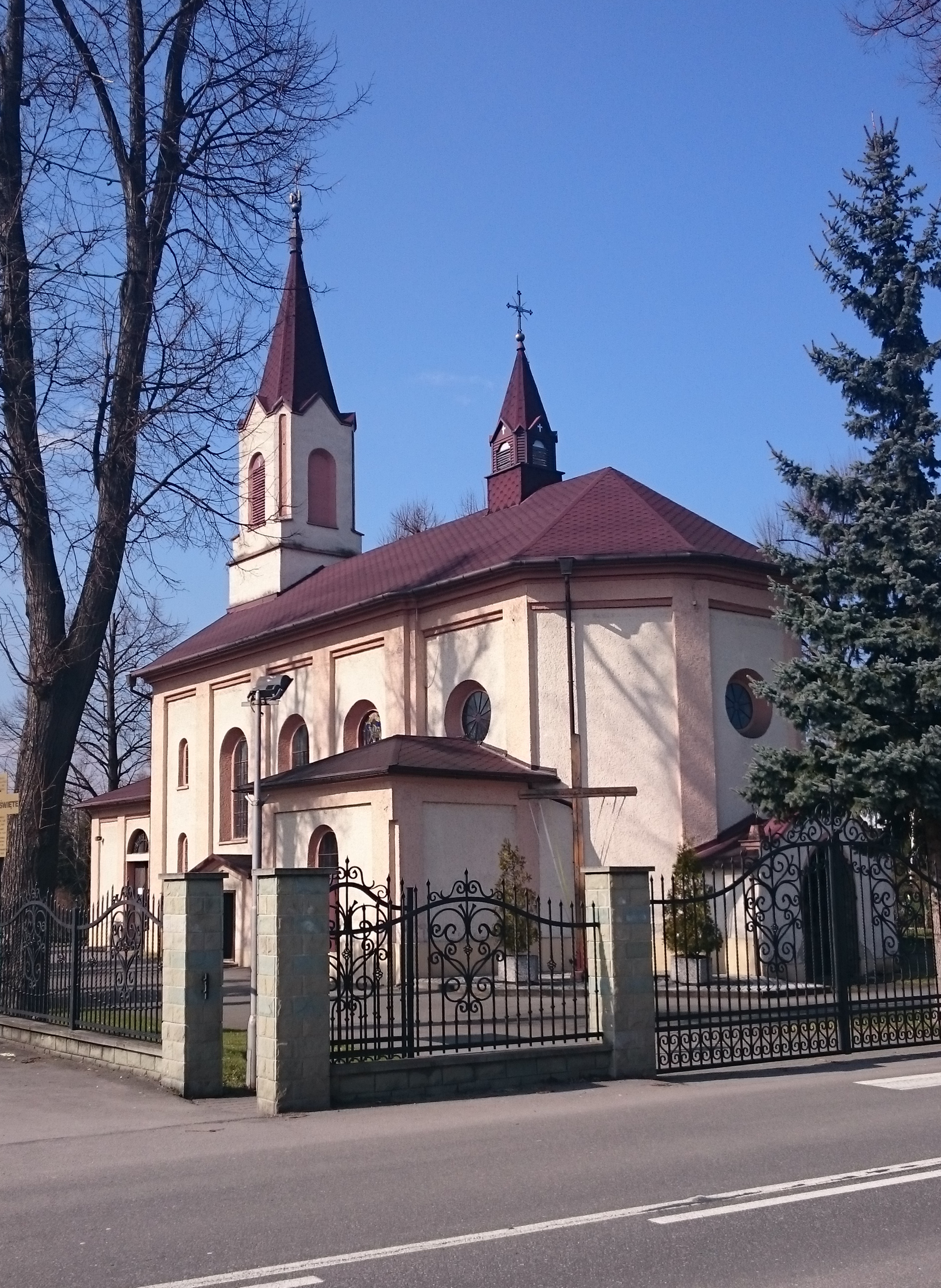 Kaniów, kościół Niepokalanego Serca NMP